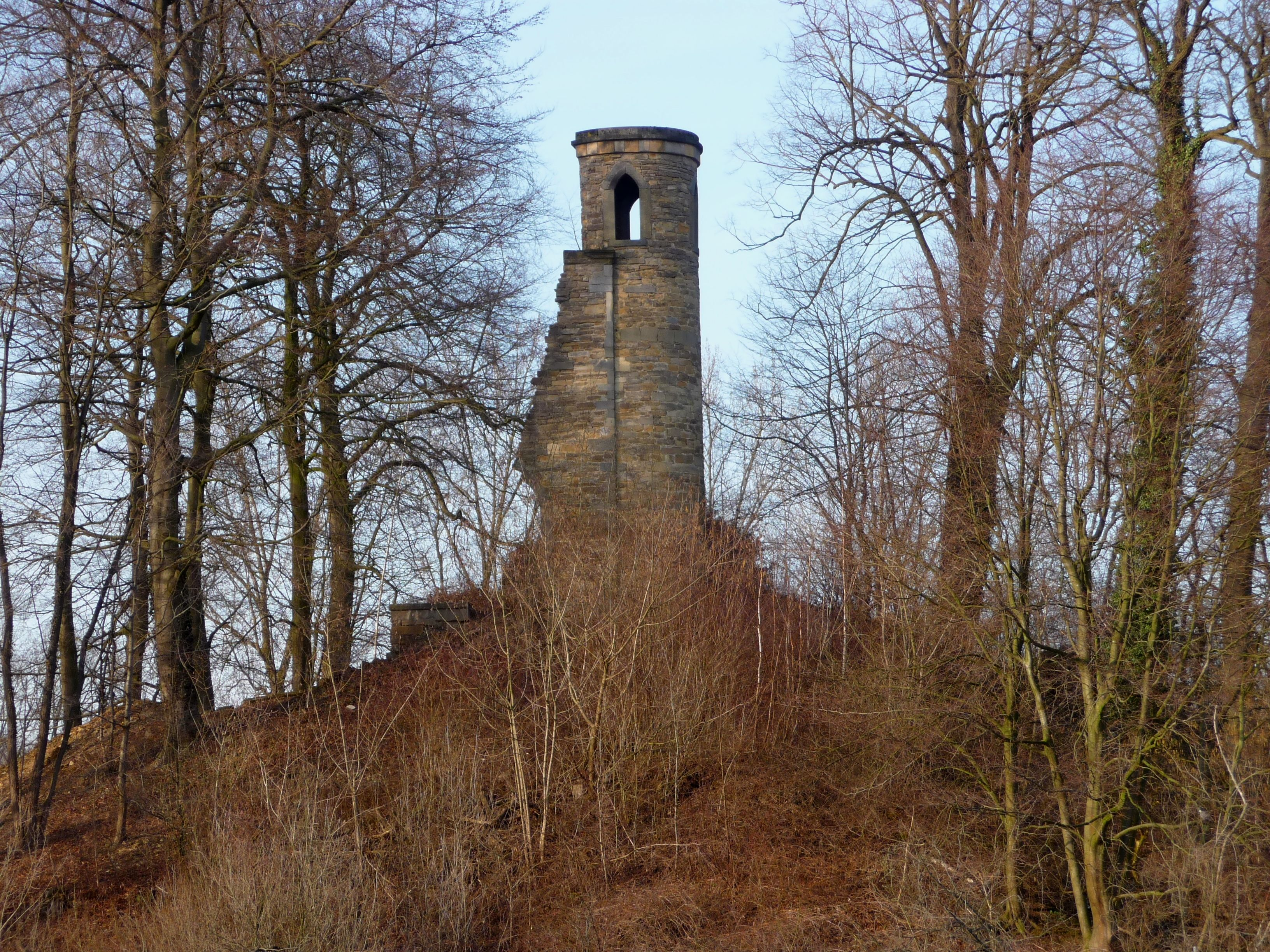 Die künstliche Ruine auf der Ruineninsel im Bagnosee / 48565 Steinfurt